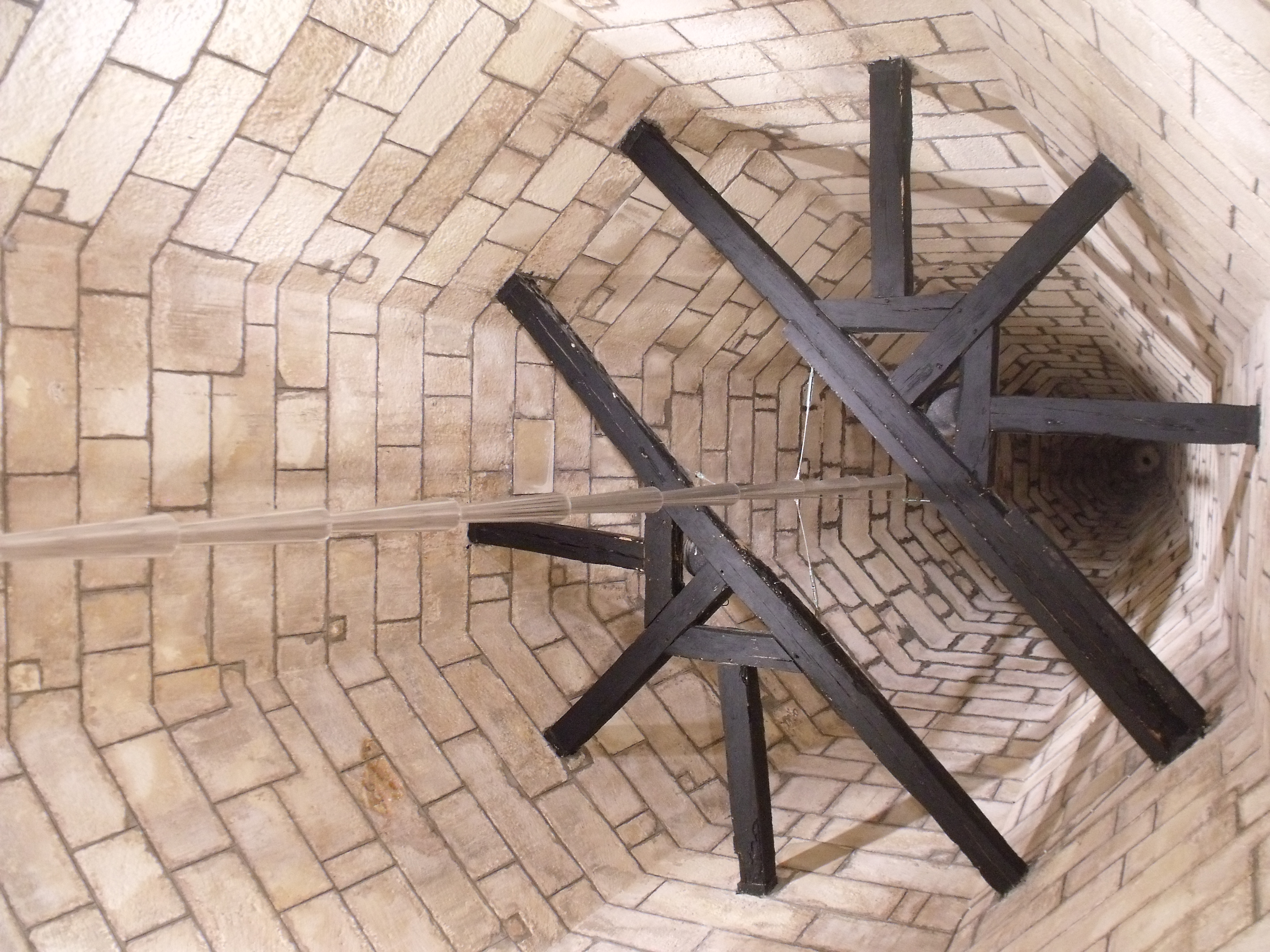 Interior de la torre de la Linterna, en La Rochela. .